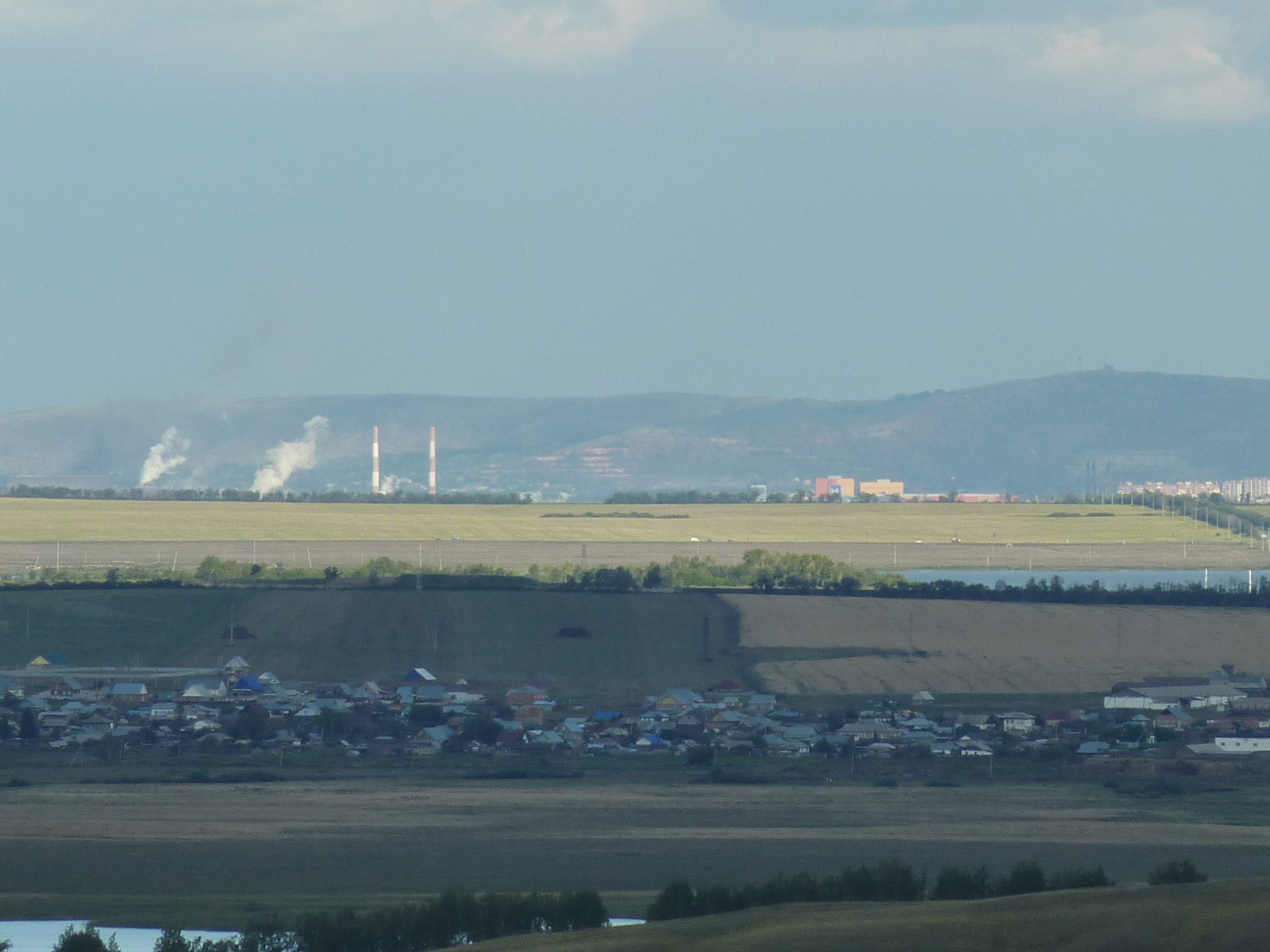 ККЦ, трубы ЛПЦ 10, ЛПЦ 11, гора Магнитная